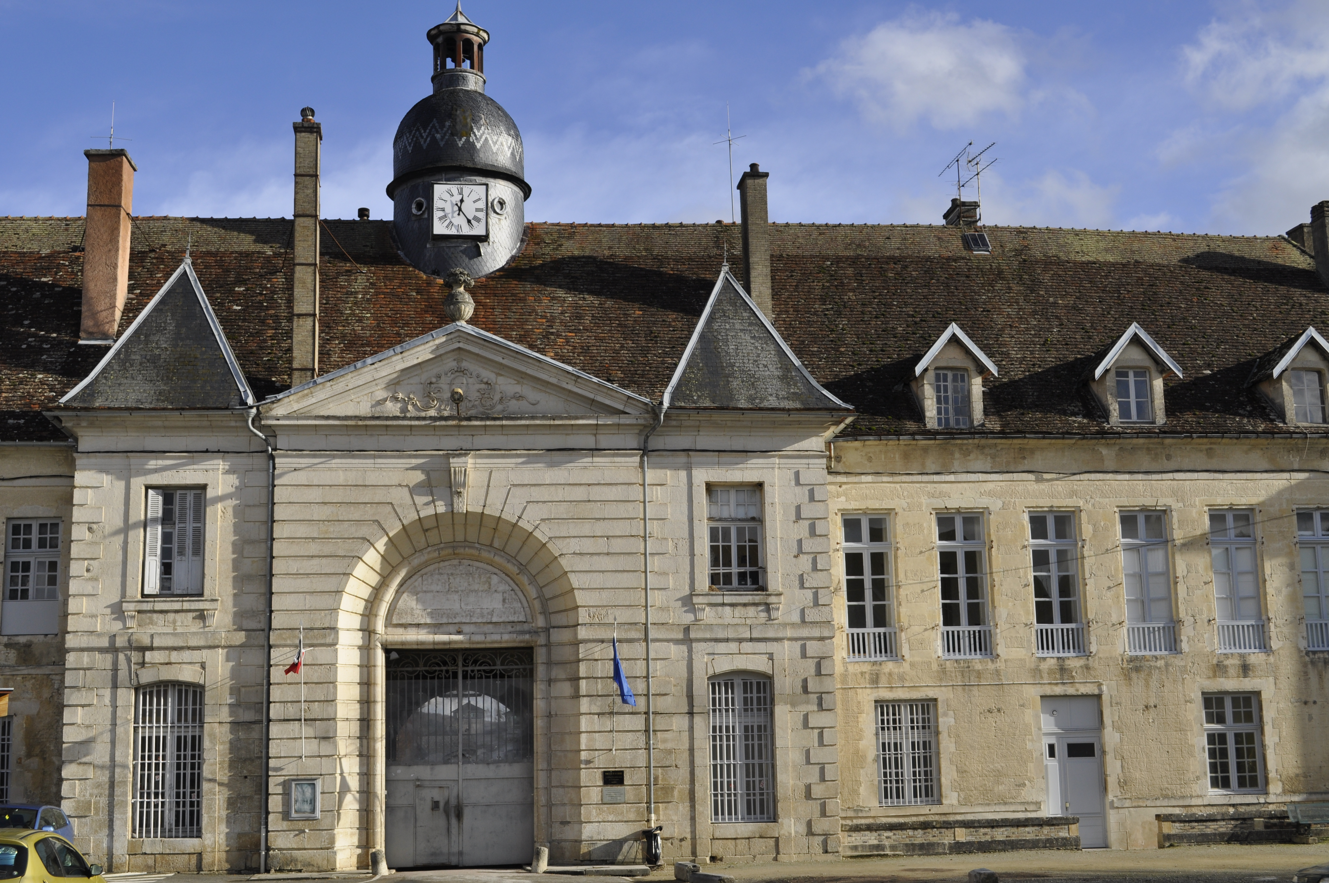 Porterie du palais abbatial. Entrée principale de l'établissement pénitentier de Clairvaux.